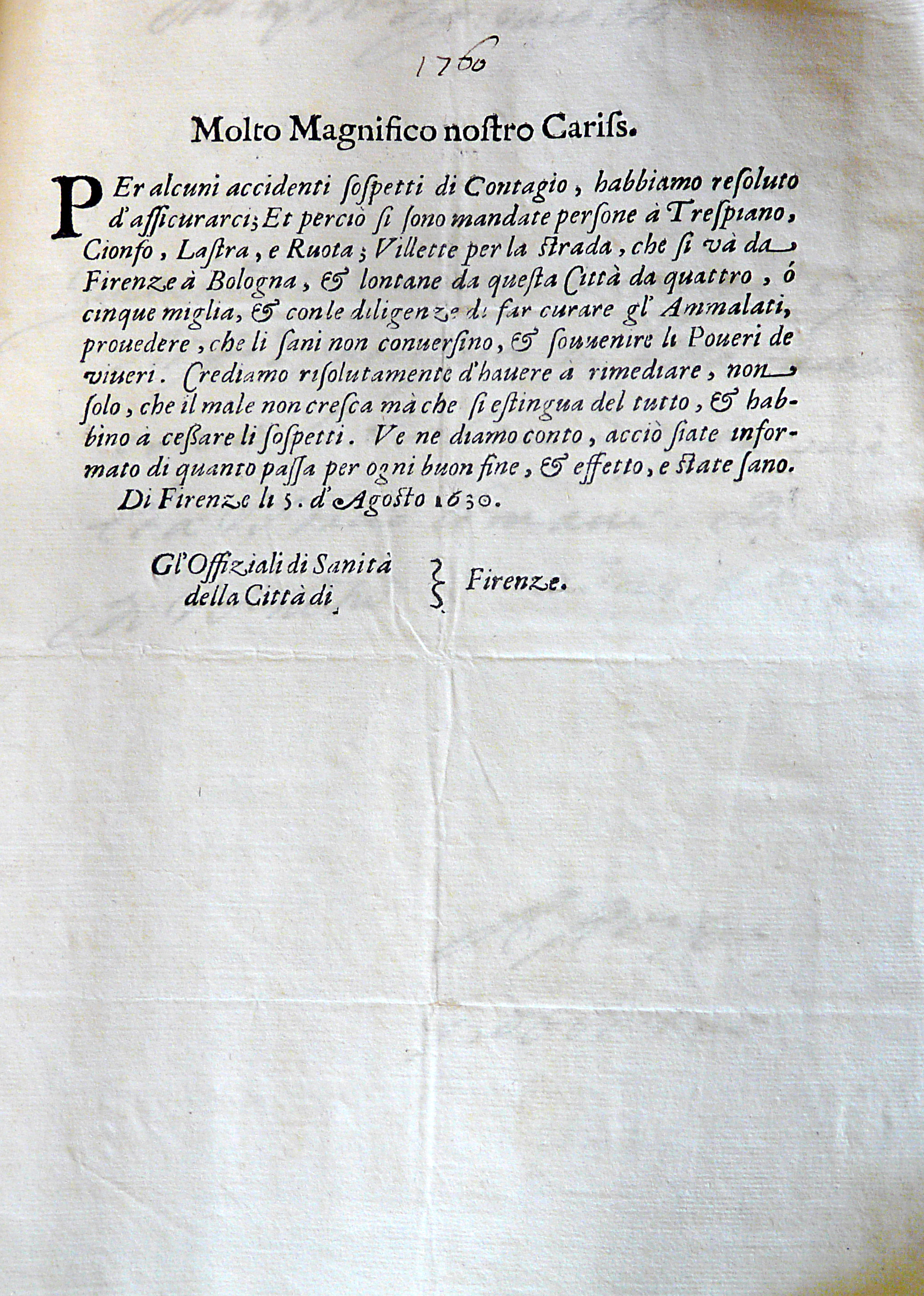 Da Firenze si ammette che la peste è entrata in Toscana, ma si spera ancora non solo di tenerla sotto controllo, ma di estinguere il contagio Bando a Stampa della Magistratura du Sanità di Firenze, Archivio storico di Vicopisano (Pi)